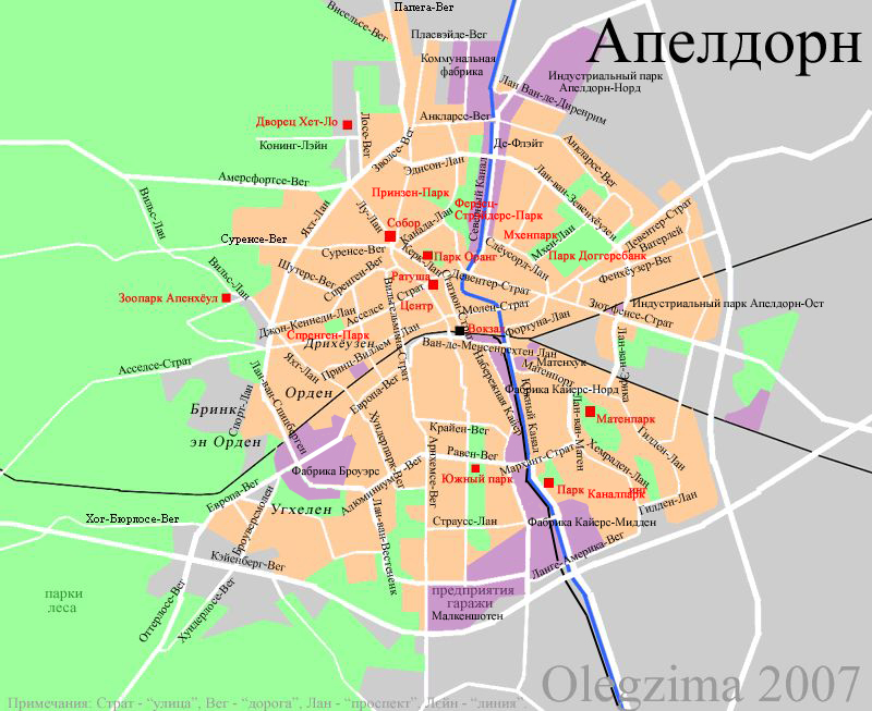 map of Apeldoorn